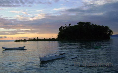 Pulau Idaman di Desa Palipi, Kecamatan Sendana, Majene